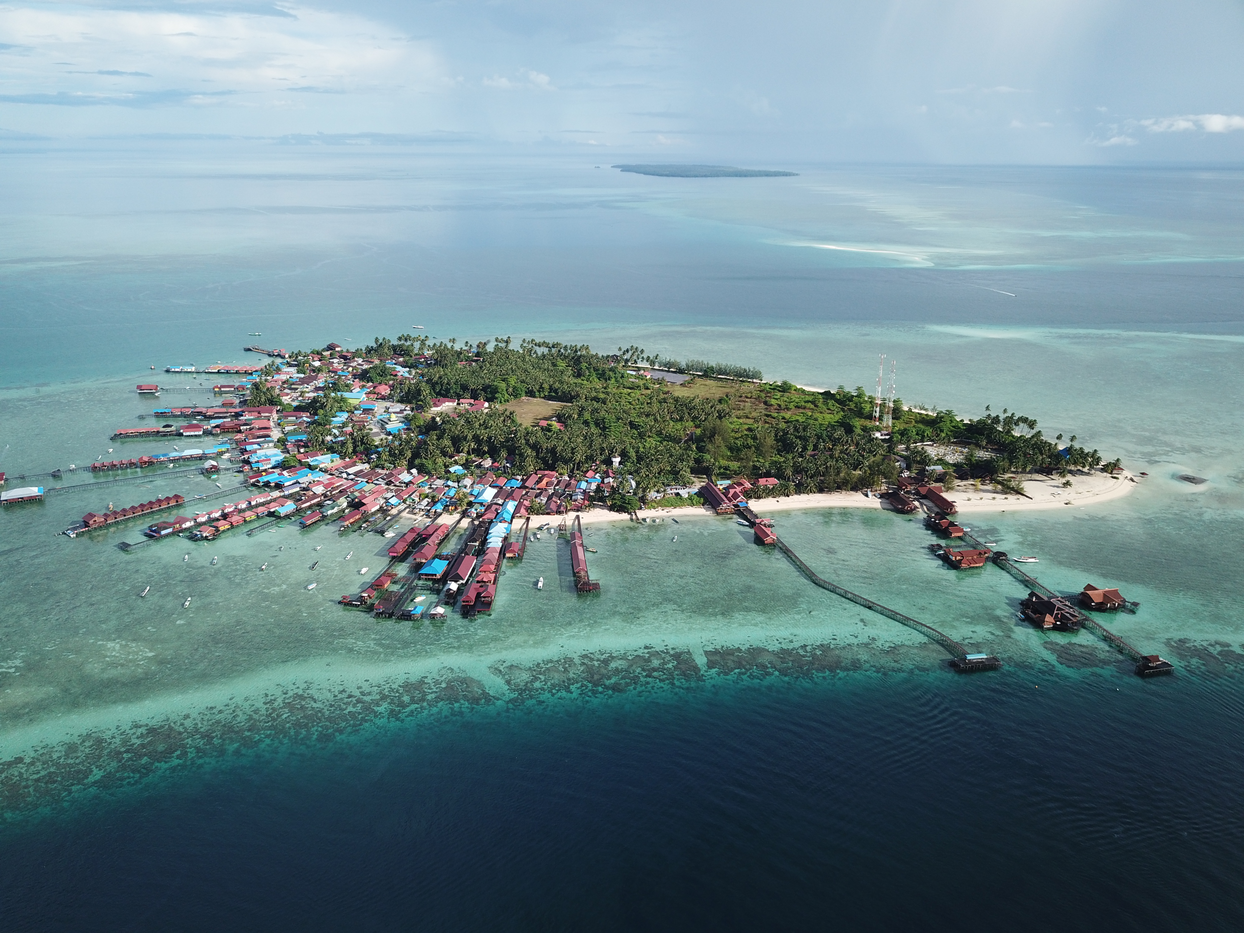 DCIM\100MEDIA\DJI_0050.JPG